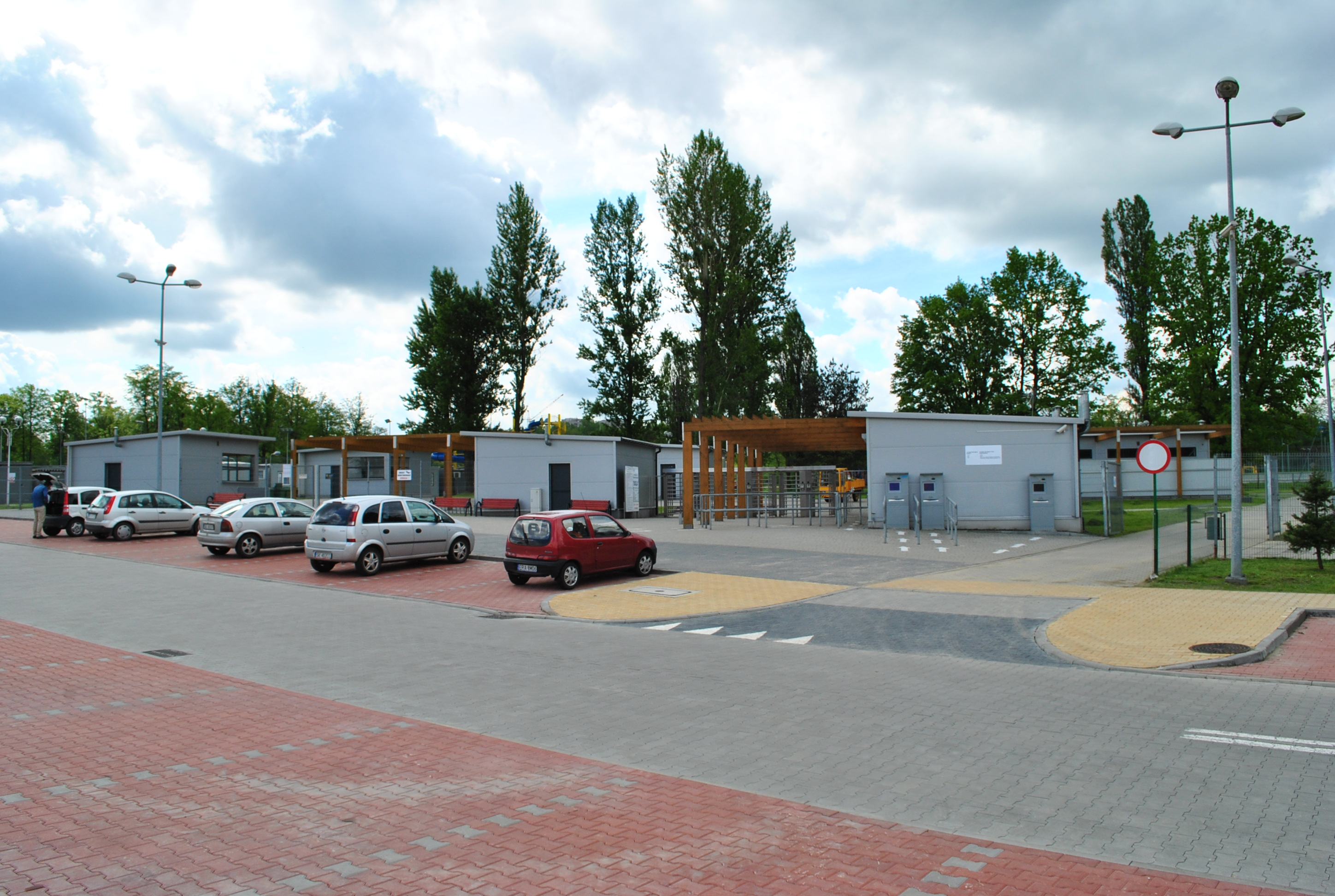 Katowice - Załęże. Kąpielisko Bugla